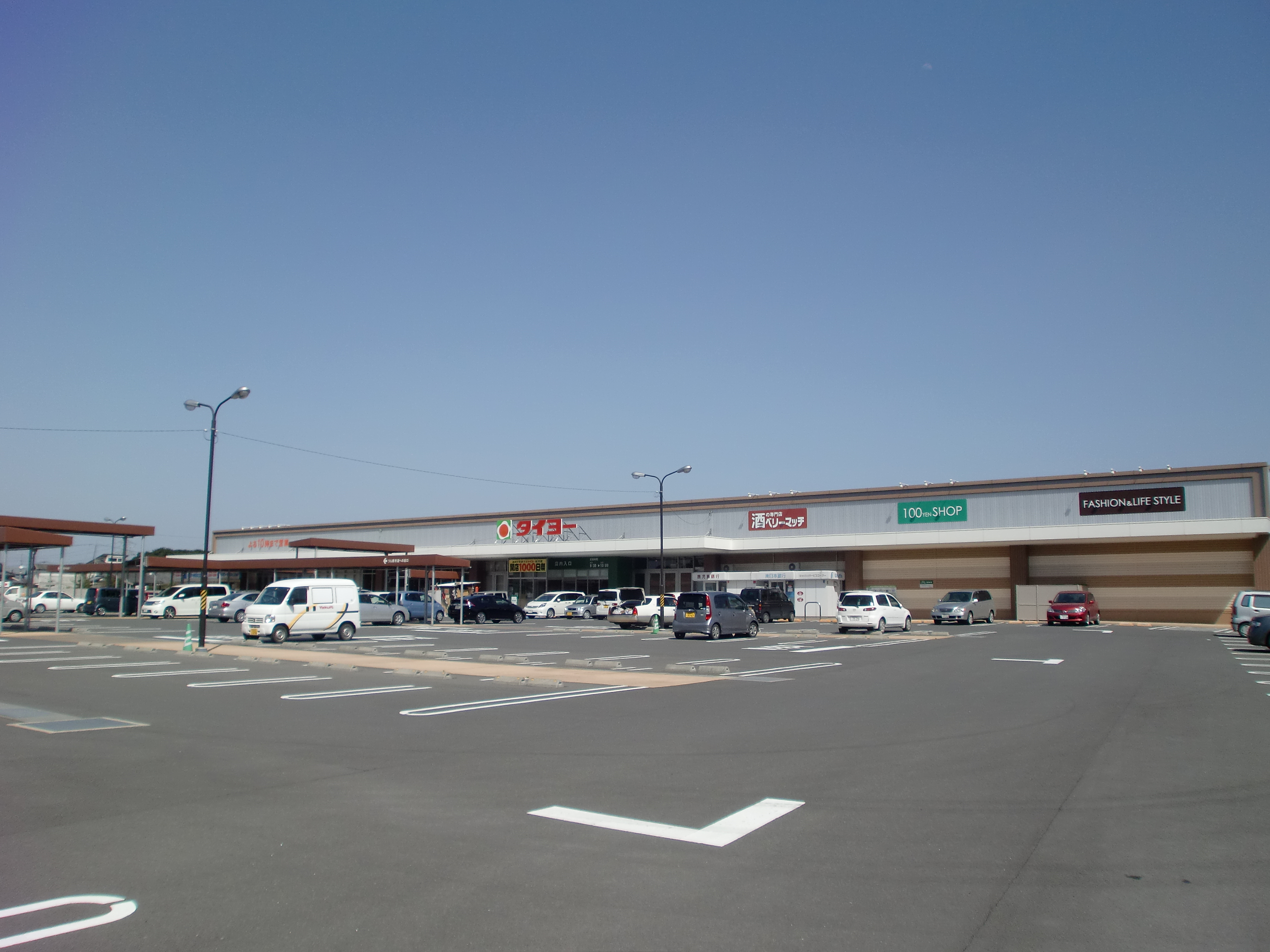 タイヨー松元店の外観。